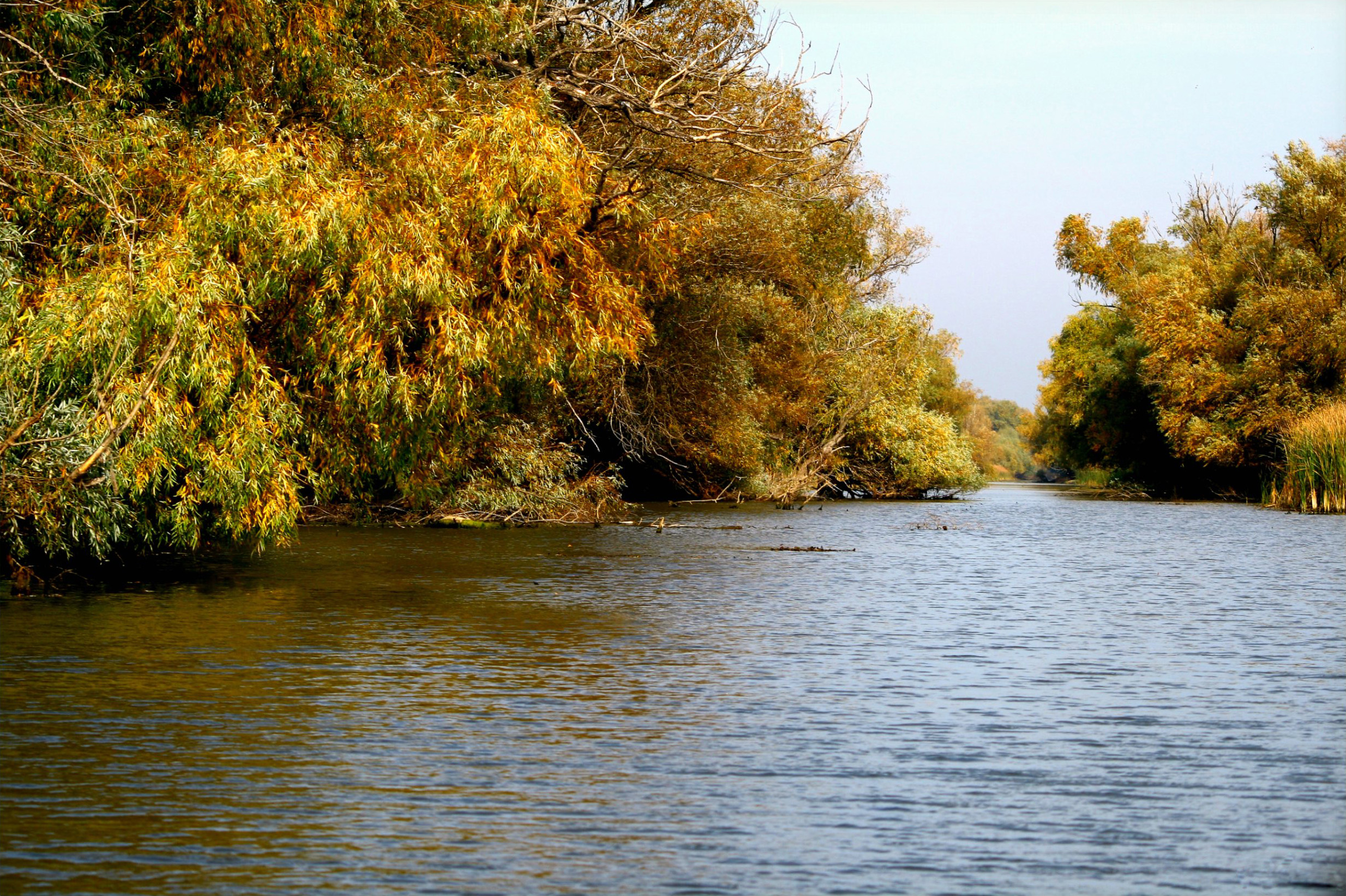 autumn in the Danube Delta